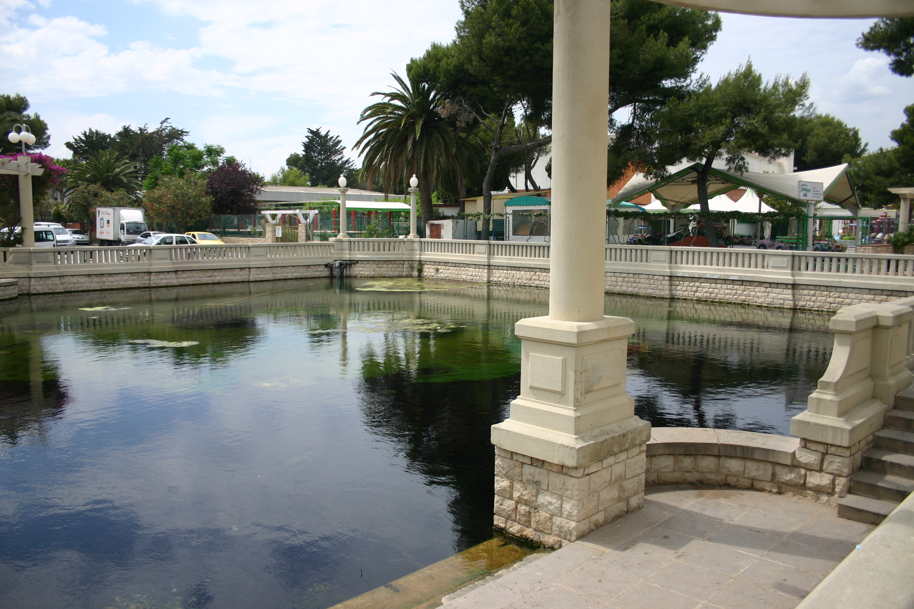 Riuet de Coma-ruga, Vendrell, Catalonia, Spain